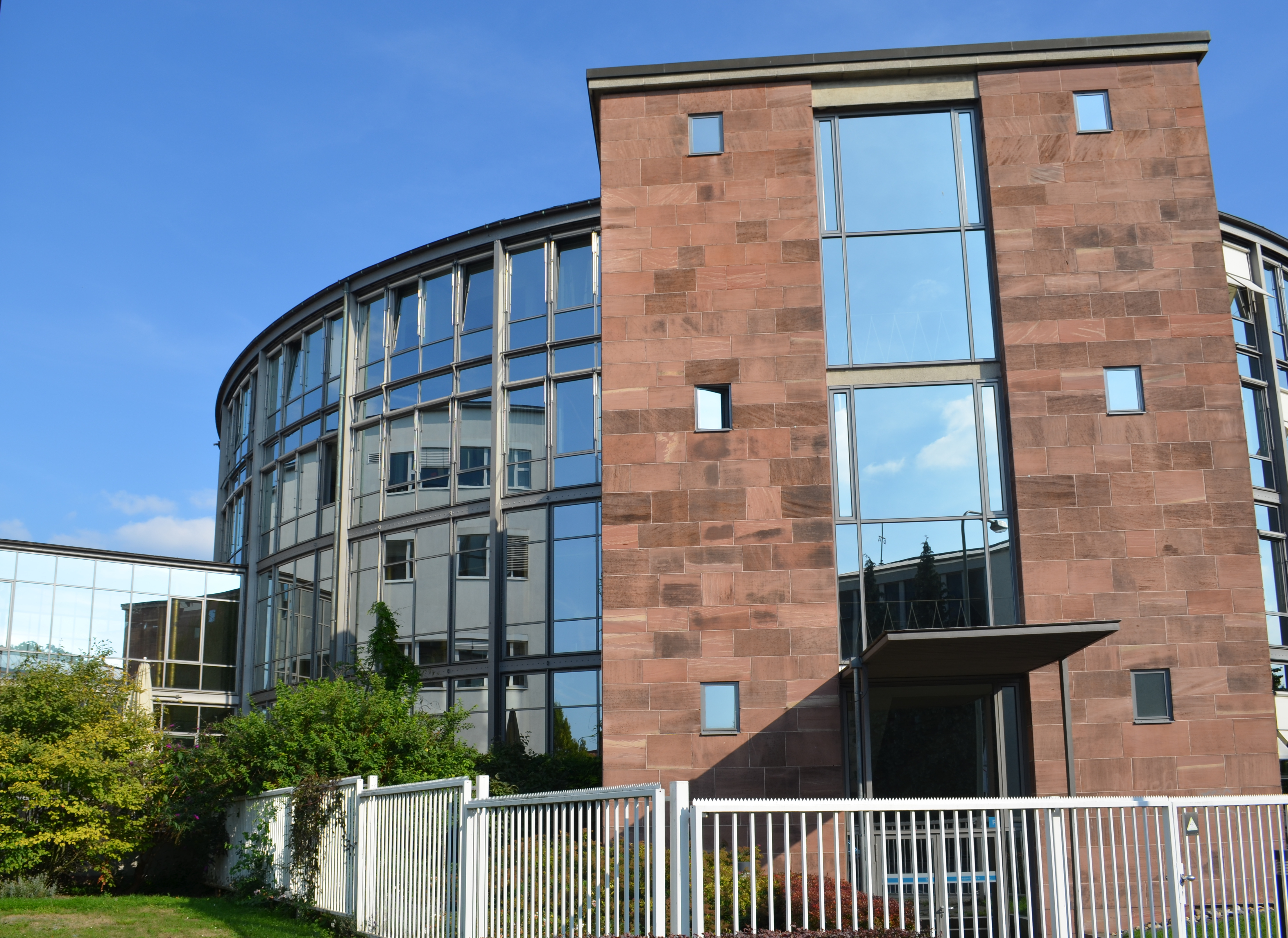 Frankfurt, HR, Rotunde